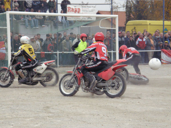 Motoballendspiel 2007